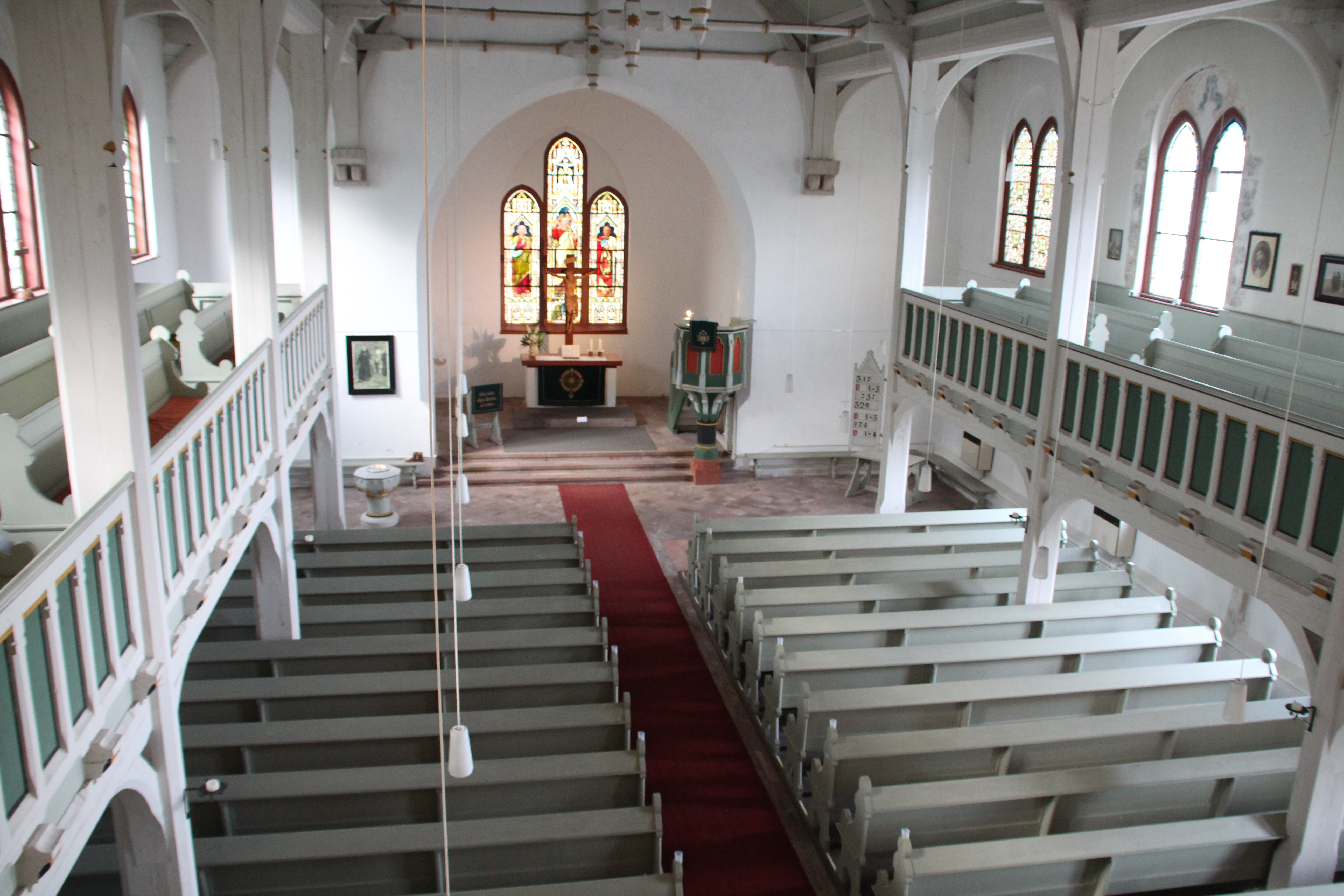 Innenansicht Kirchenschiff von er Orgel aus